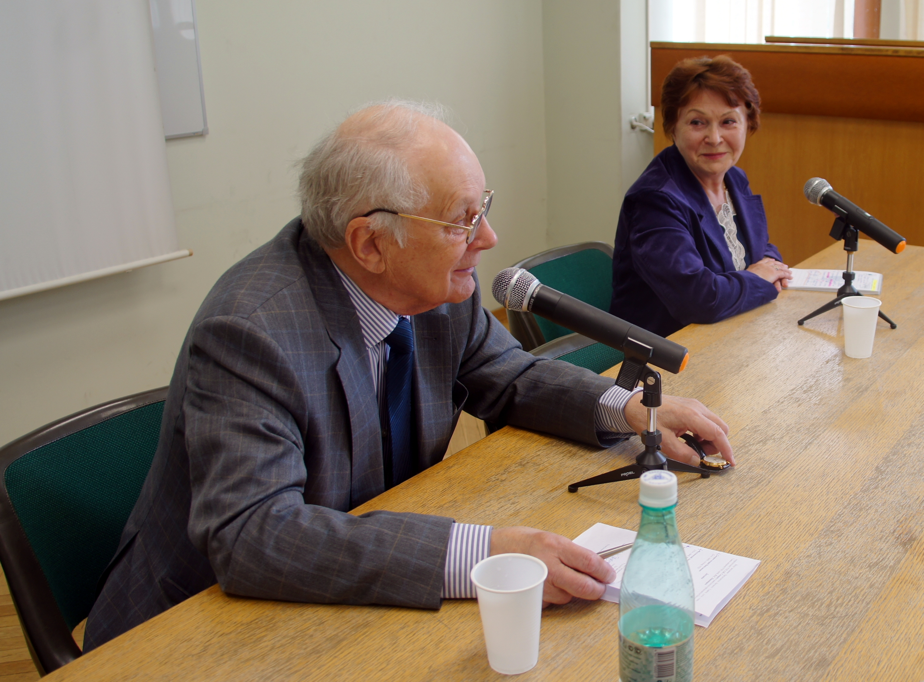 А. Н. Сахаров - ведущий конференции в ИНИОН РАН